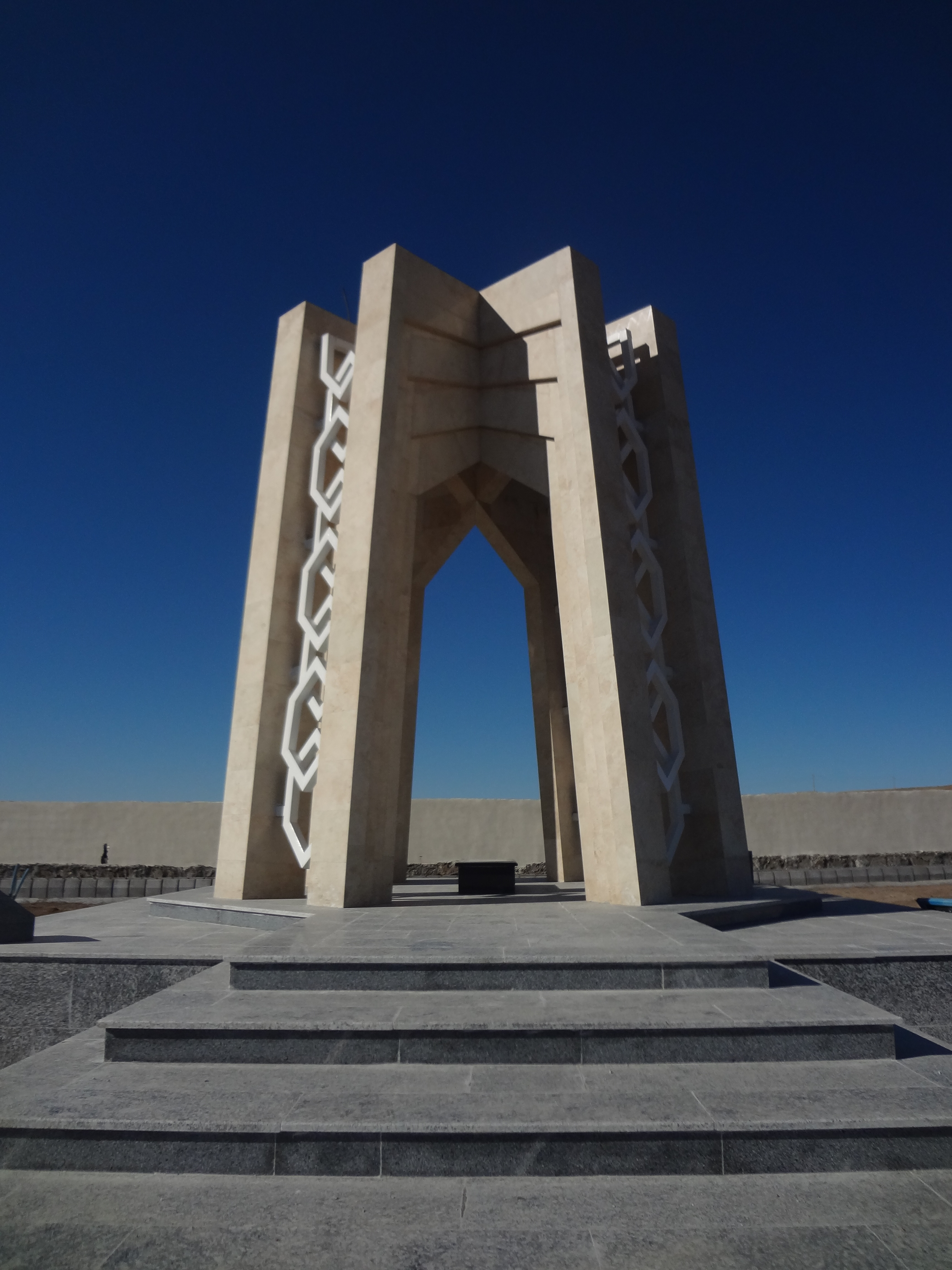 مقبره محمدباقر خلخالی در روستای قره بلاغ از توابع بخش کاغذکنان تاریخ و زمان گرفته شدن عکس: 4آذر سال 1395 در 12:06